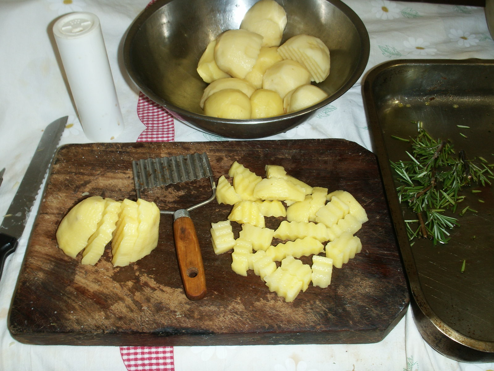 Patate al forno, tagliare a cubetto